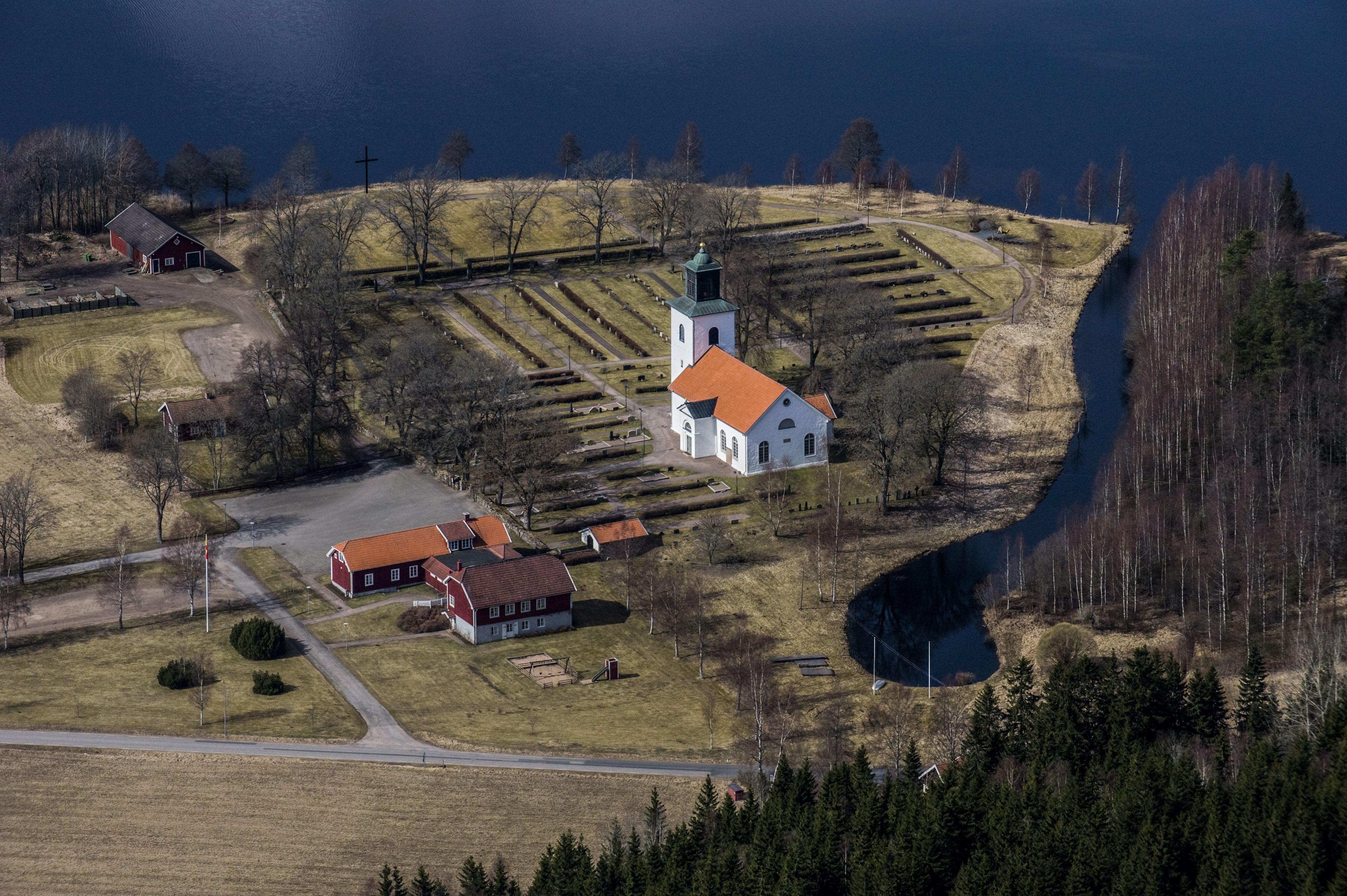 Sandhems kyrka